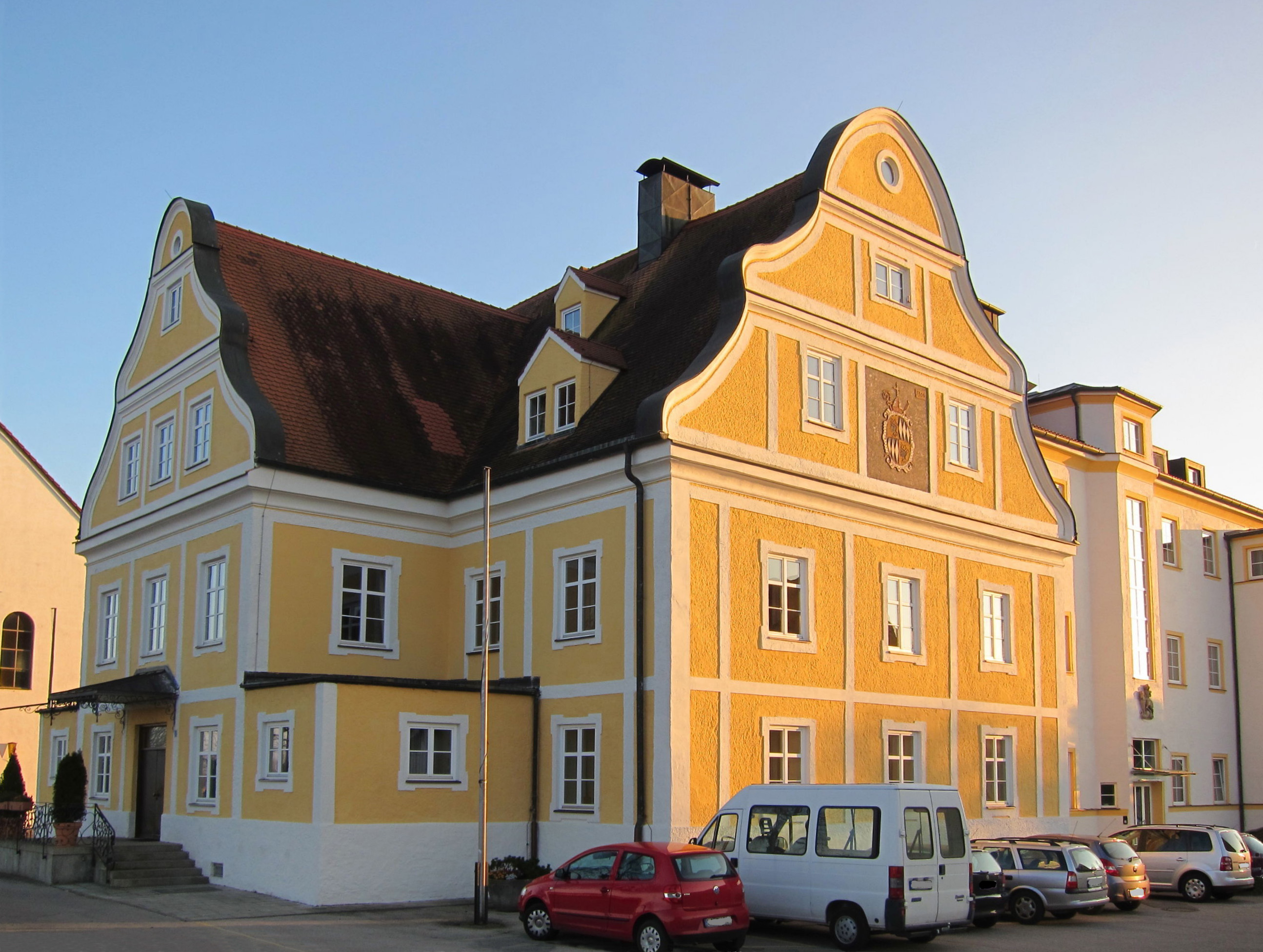 Schloss Birkeneck; zwei sich kreuzende Flügel mit Schweifgiebeln, um 1708 (Südteil modern), mit Kapelle.